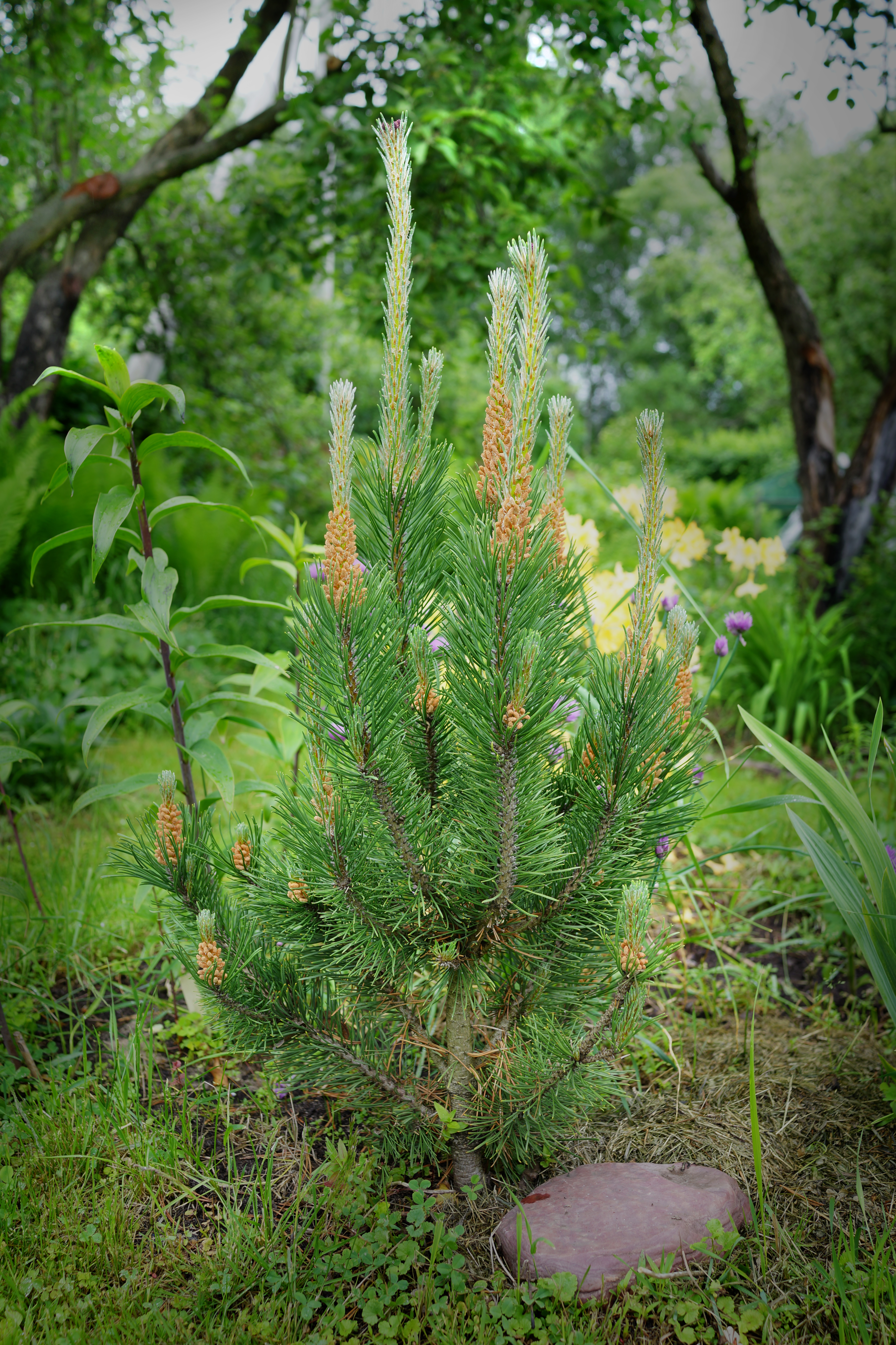 Россия, Владимирская область, частный сад